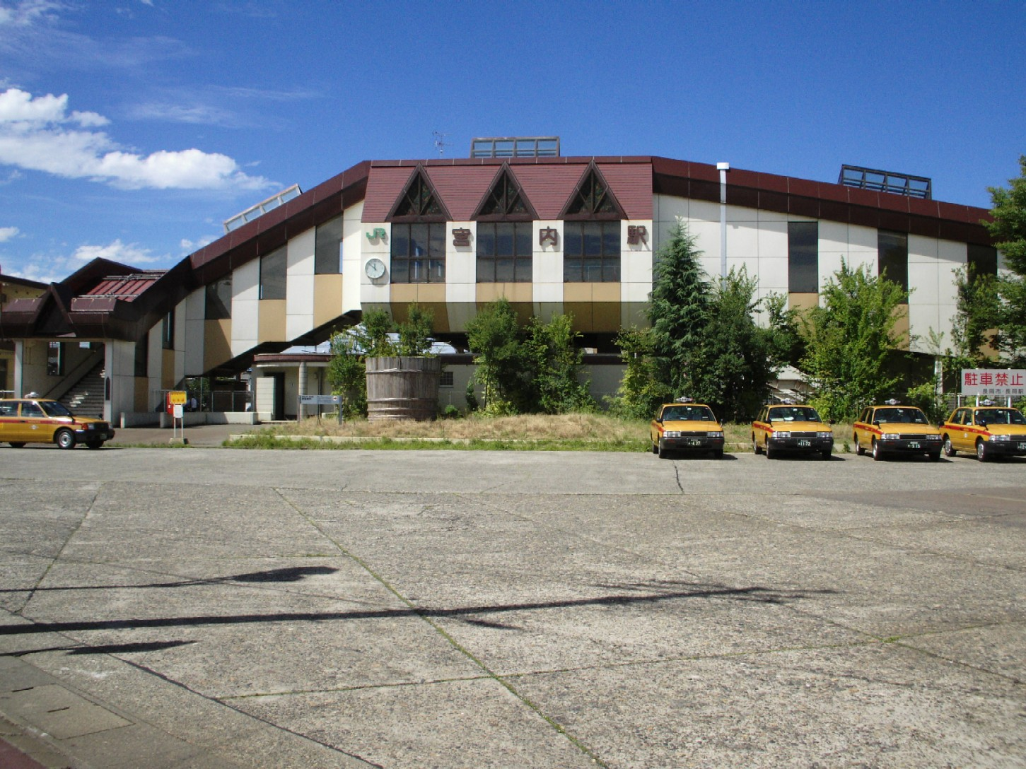 宮内駅東口